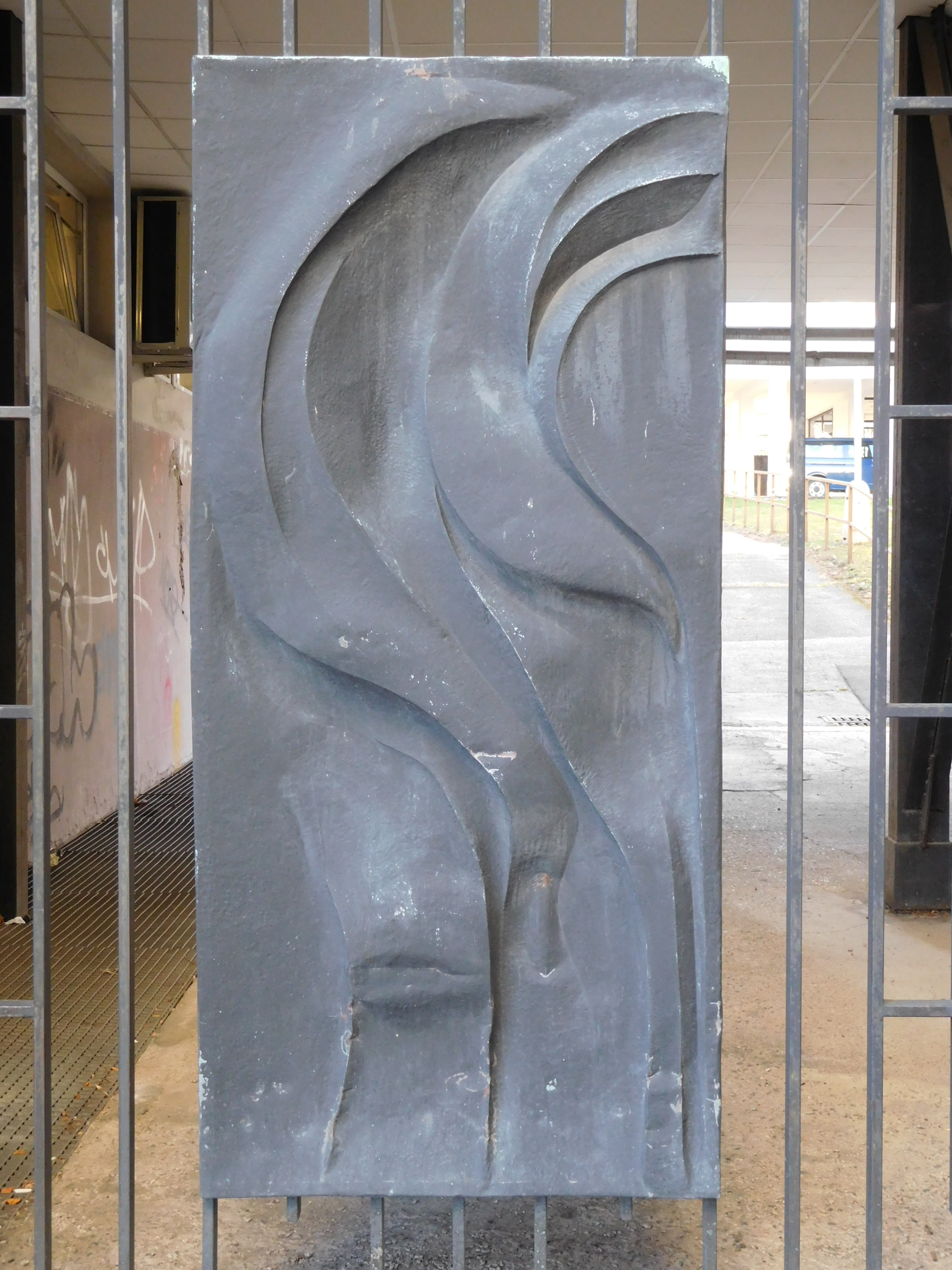 Praha - Pankrác, Na Pankráci 74; reliéf na budově Ministerstva vnitra (Jaroslav Šajn)